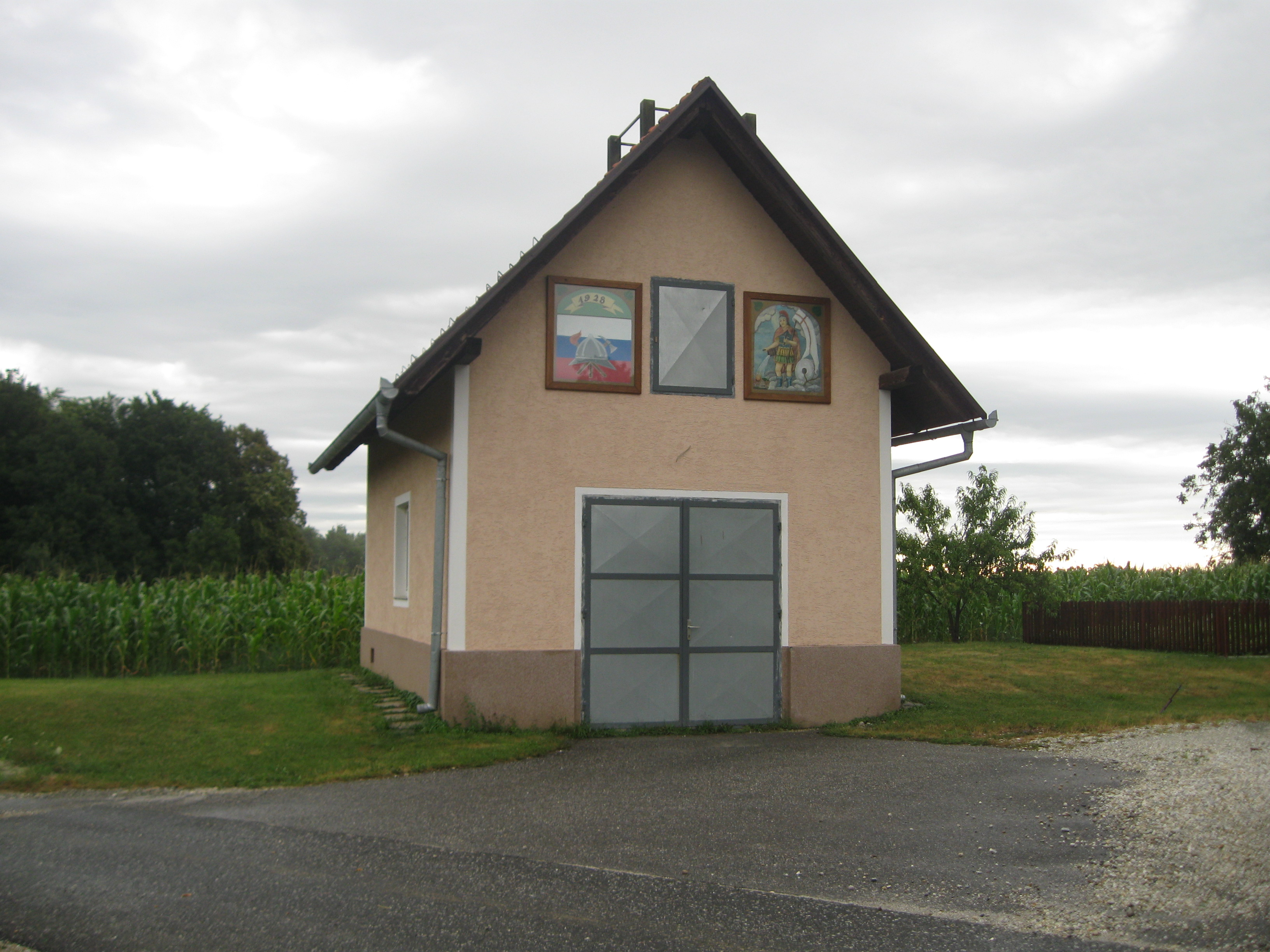 Stari Gasilski dom na Stari Gori Postavljen leta 1928.